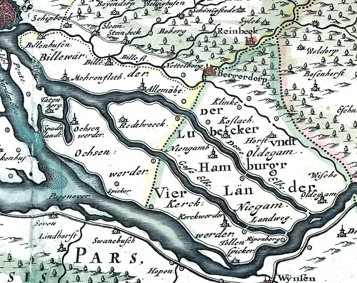 Elbinseln bei Hamburg um 1650 - Ausschnitt aus File:Joh Mejer Stormarn 1650.jpg